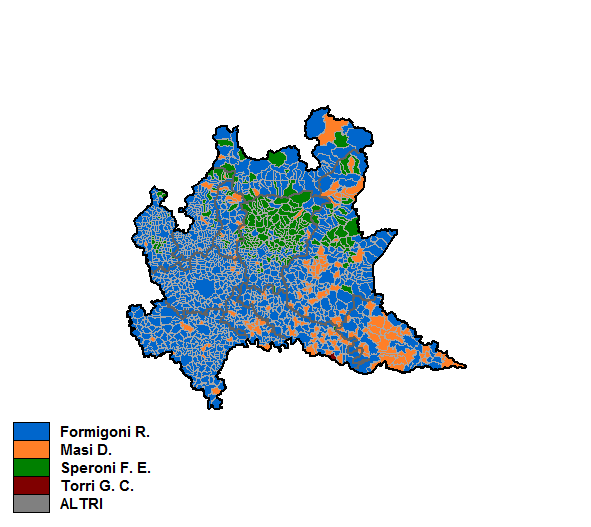 Candidati vincitori nei singoli comuni nelle Elezioni regionali in Lombardia del 1995.